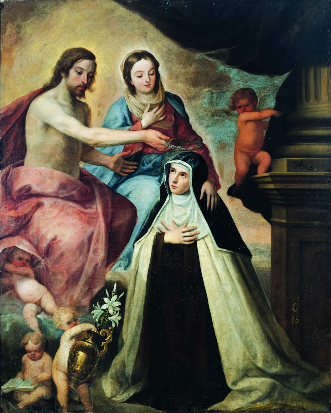 La obra representa a Santa María Magdalena de Pazzi (1566-1607), teniendo una visión de Cristo resucitado y de la Virgen María.